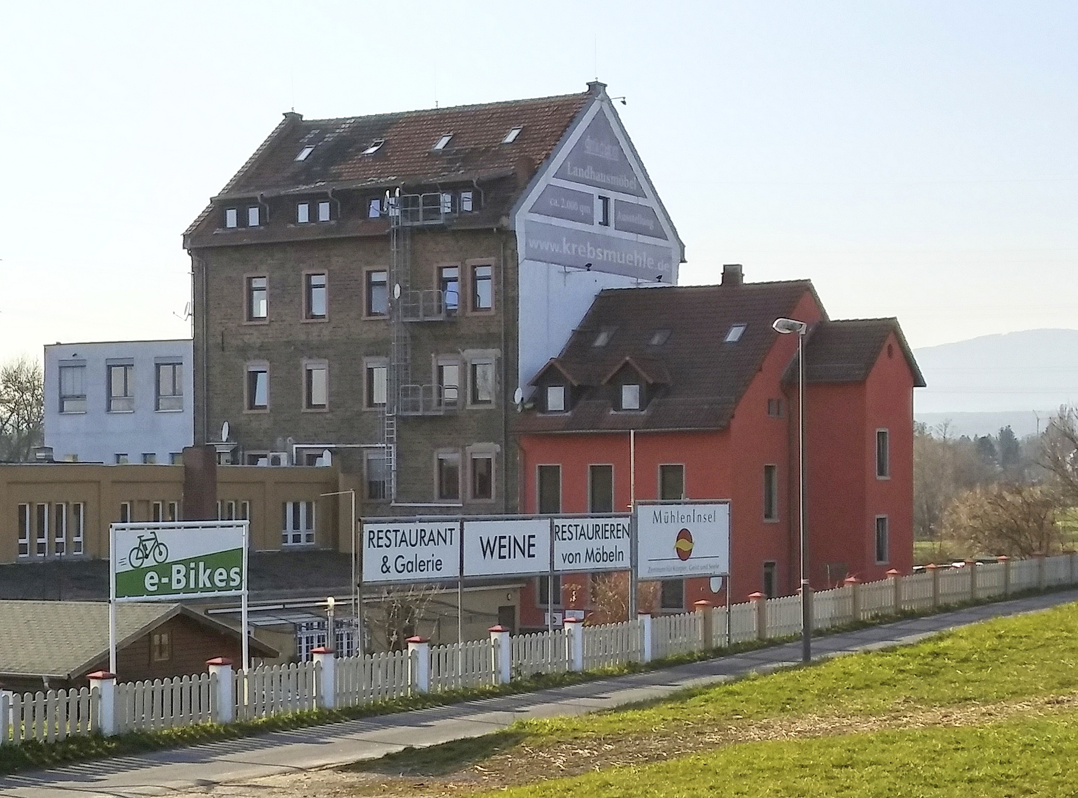 Krebsmühle von der Rosa-Luxemburg-Straße Kreuzung Krebsmühle aus